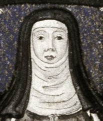 Isabelle de France (1225-1270)